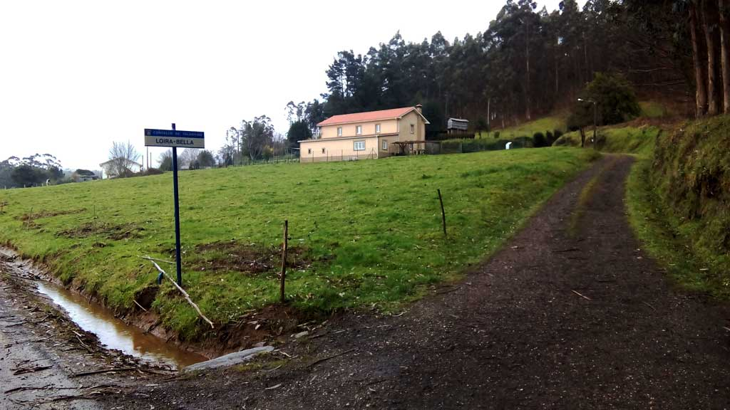 Vista de Loiravella, Valdoviño.